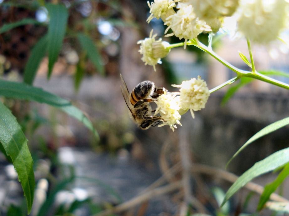 Abejas